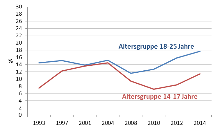 Anteil Heranwachsender und junger Erwachsener, die in dne letzten 12 Monaten minestens einmal Cannabis konsumierten, 1993-2014